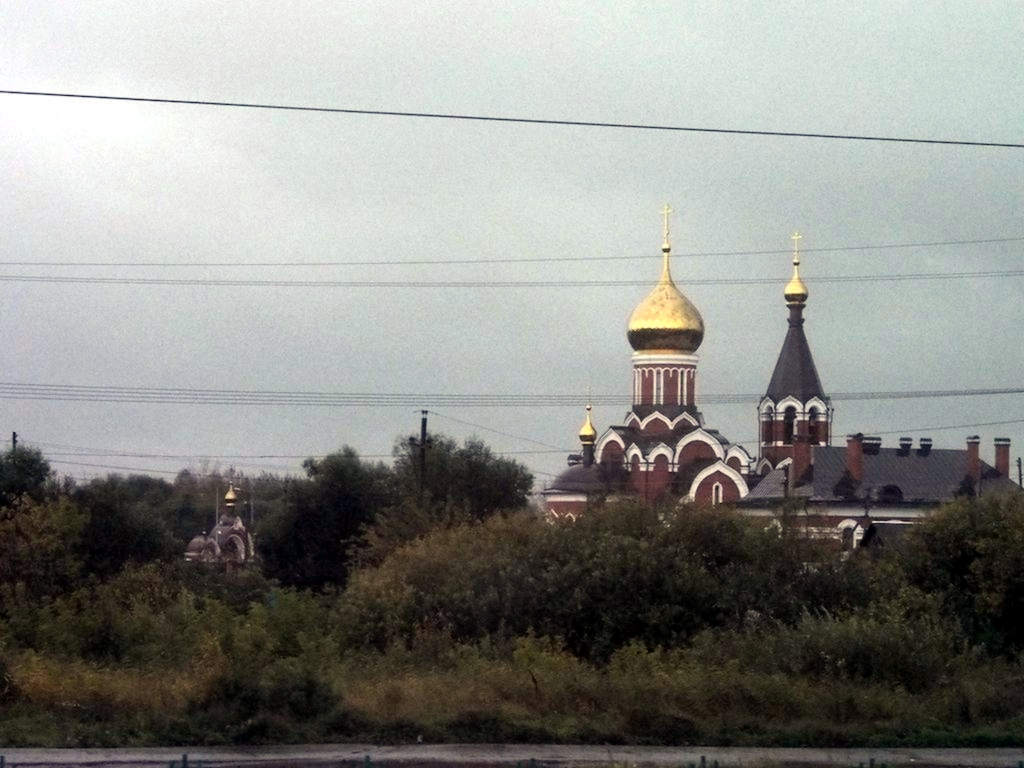 Siberia